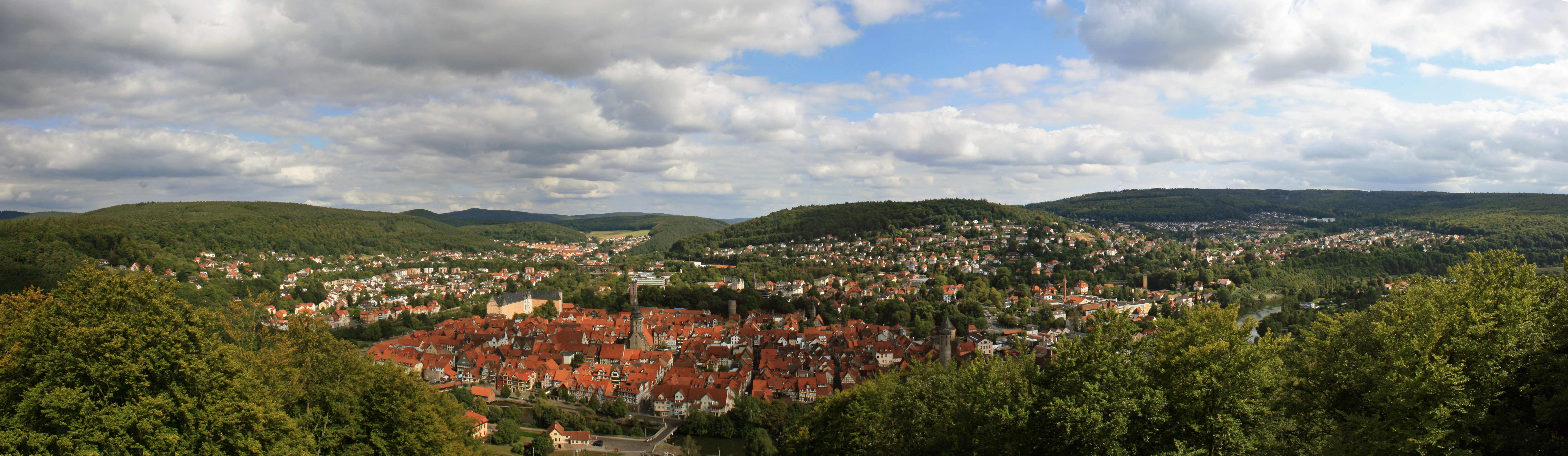 Blick von der Tillyschanze in Hann. Münden am 1. September 2012